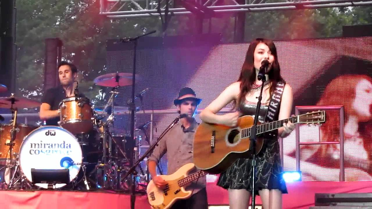 Miranda Cosgrove interpretando "Shakespeare" en su Summer Tour de 2011